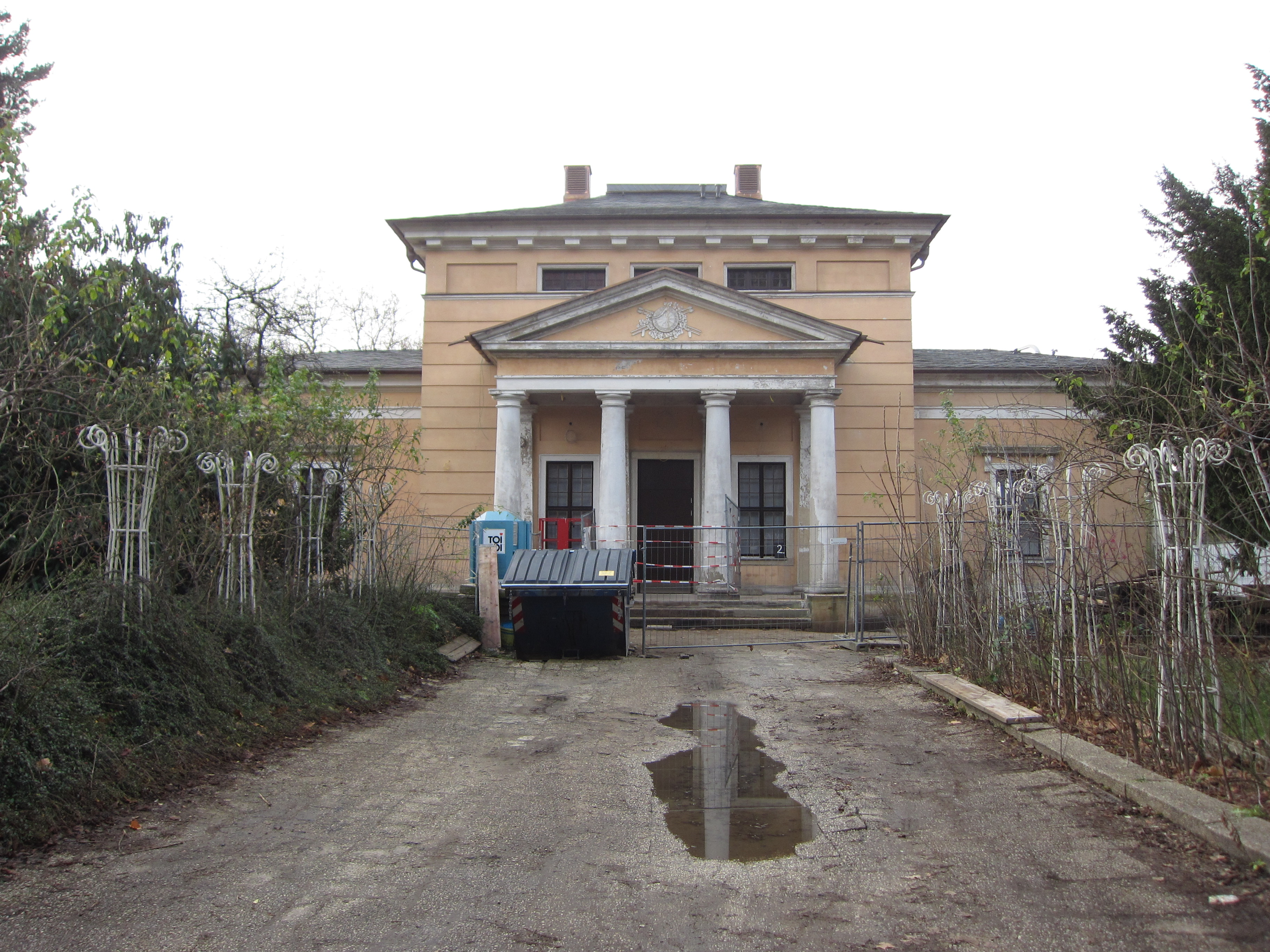 Die Torhäuser Leipziger Tor waren zwei Torhäuser am heutigen Palaisplatz in Dresden. Das nordöstliche der beiden 1827/1829 von Gottlob Friedrich Thormeyer errichteten Torhäuser existiert heute noch.